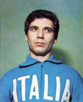 CAMPIONI dello SPORT 1968/69-n.335- PINELLI - SCHERMA (ITA)-Rec